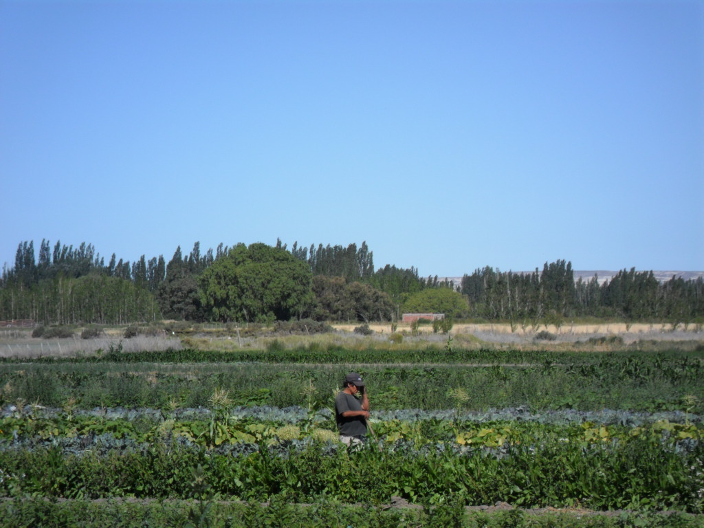 Inmigrante boliviano trabajando la tierra en una chacra del valle inferior